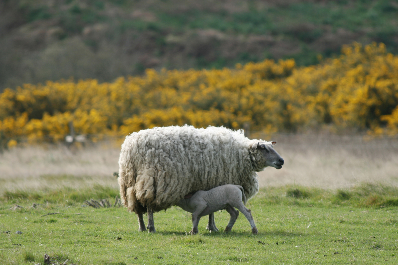 Agneau tétant sa mère à Belle-Ile